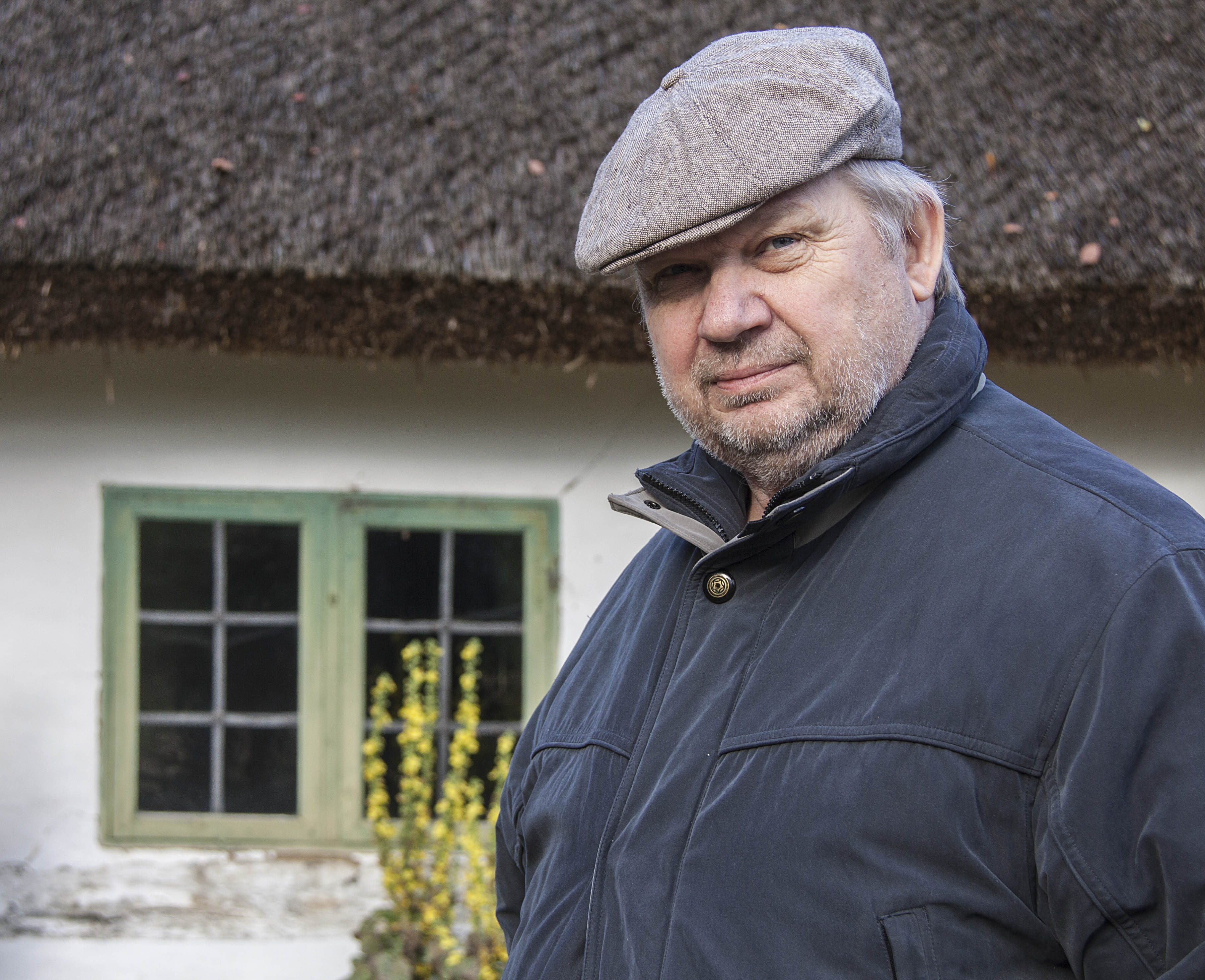 Byahornet